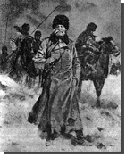 Gen. Liniewicz pod Mukdenem